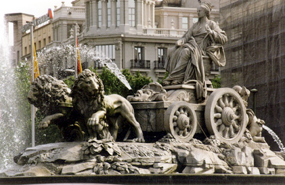 Fuente de Cibeles, en Madrid.